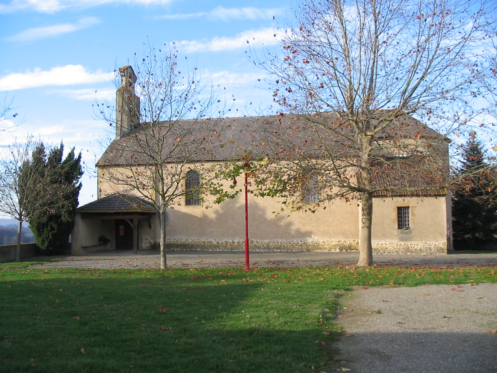 Eglise Saint-Barthélemy